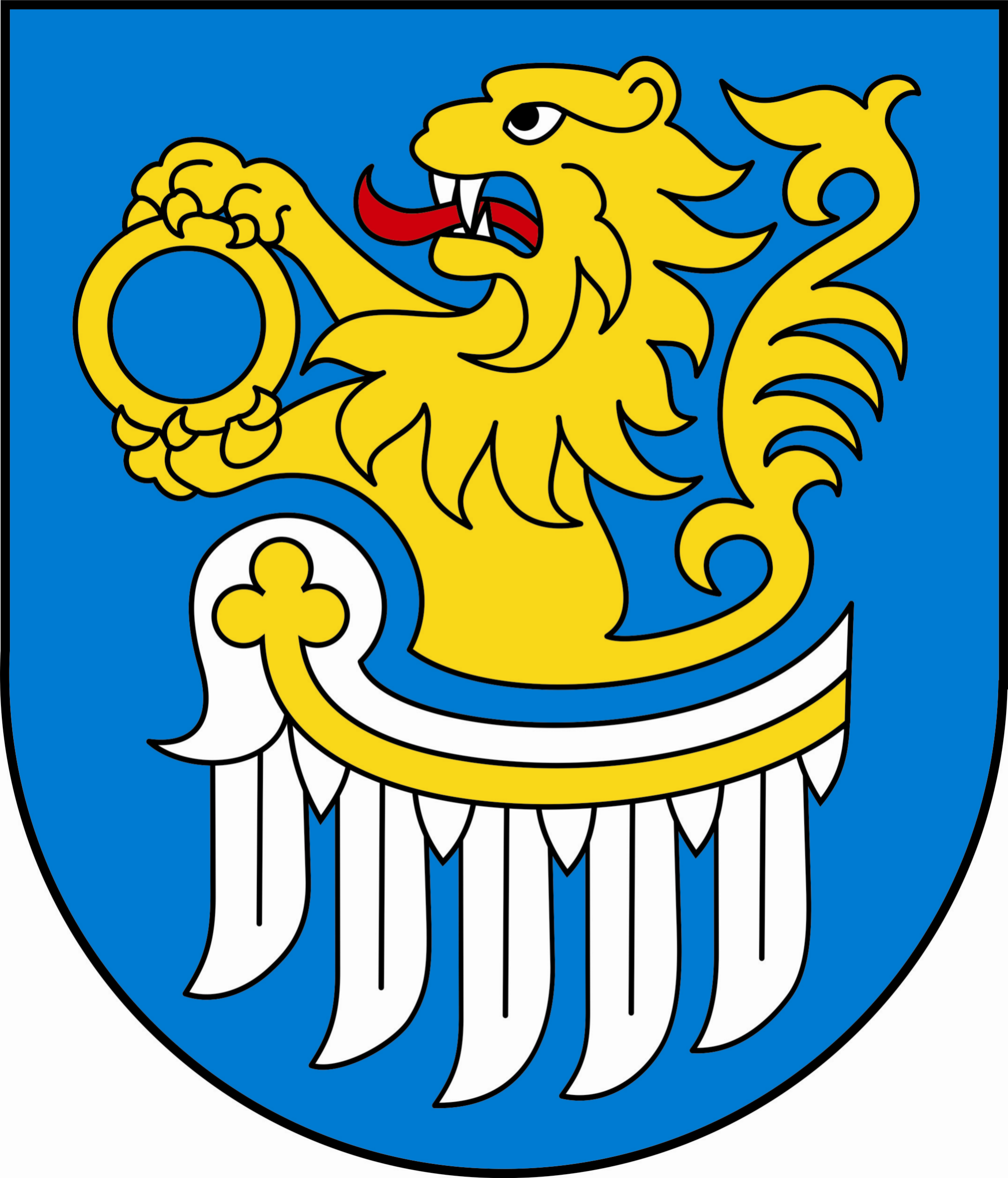 Herb gminy Bulkowo